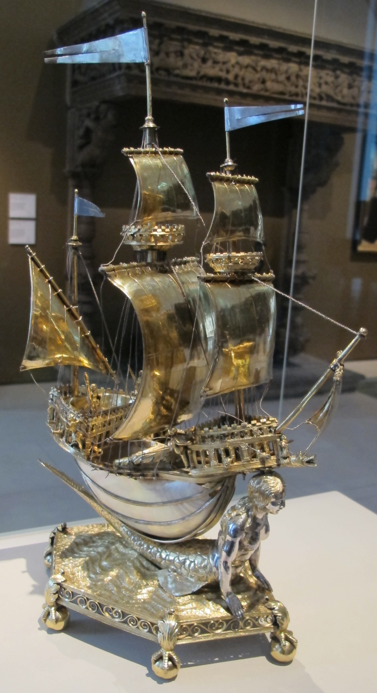 Parigi, burghley nef, saliera, 1527-28